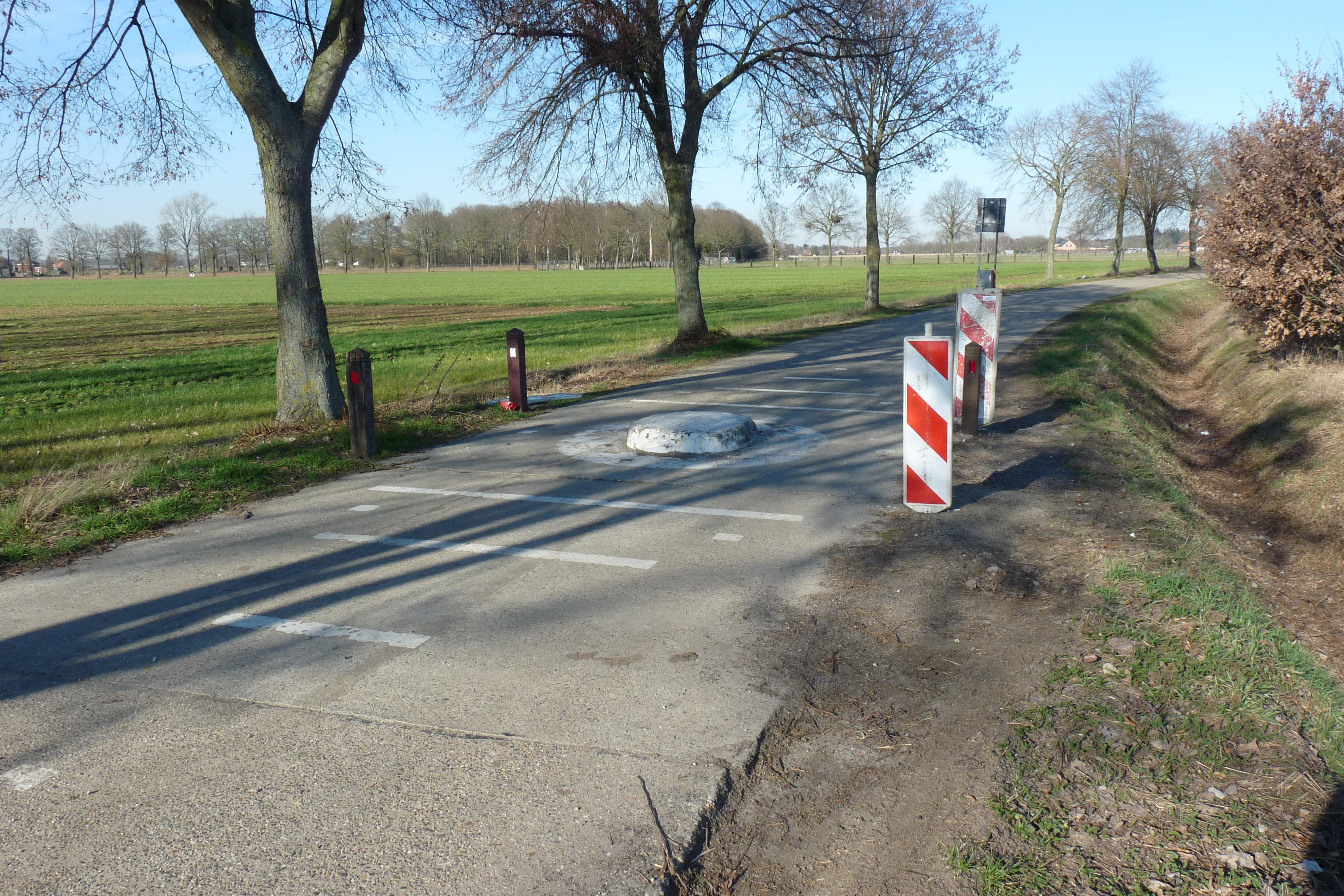 Carterbreker (ook genaamd: carterkiller,carterrammer,cartervanger,tractorsluis)